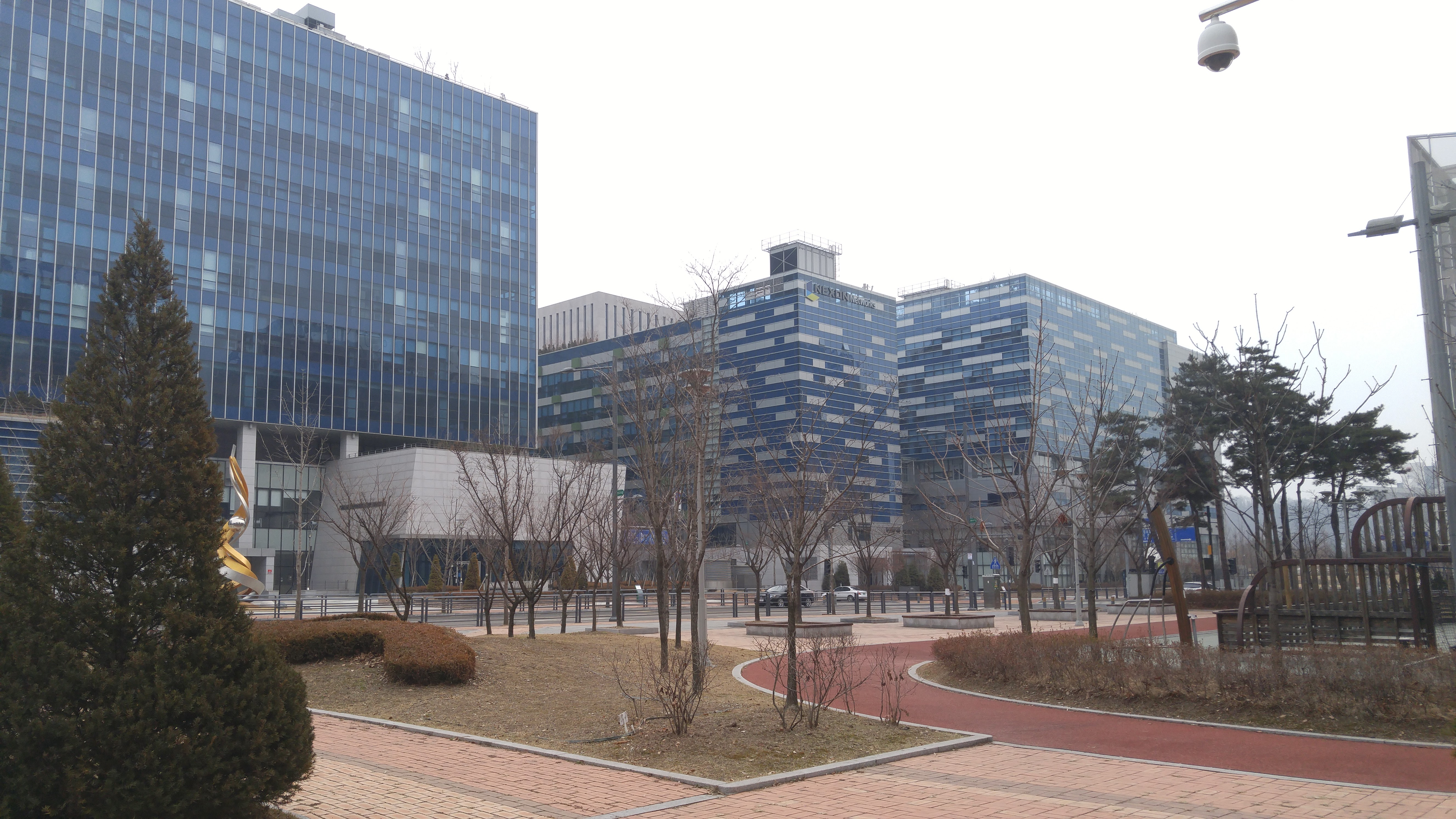 판교